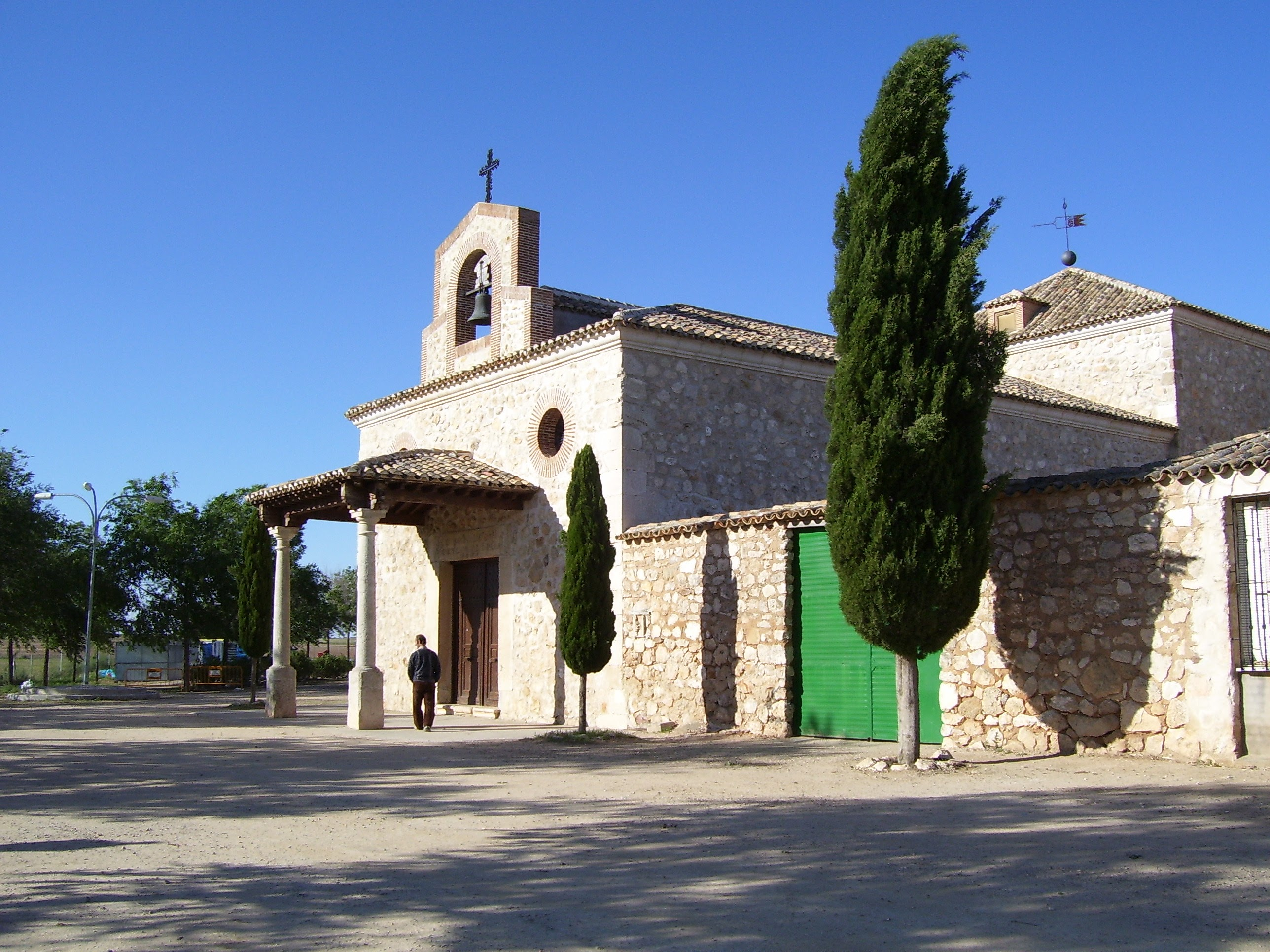 Ermita de Esperanza. Término municipal de Lillo.